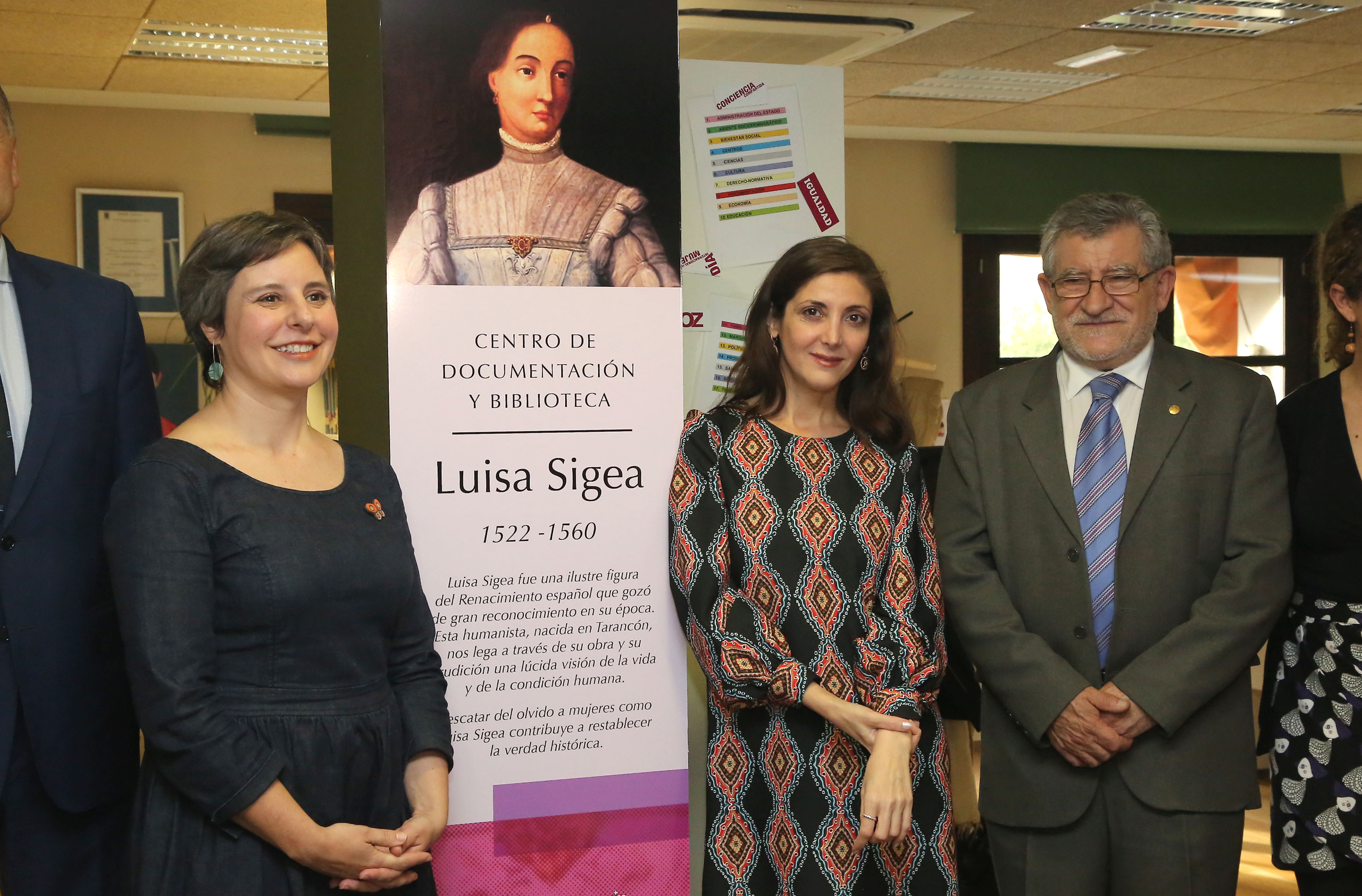 Toledo, 25-10-2016.- El consejero de Educación, Cultura y Deportes, Ángel Felpeto, y la directora del Instituto de la Mujer, Araceli Martínez, inauguran el Centro de Documentación y Biblioteca ‘Luisa Sigea’, y la nueva carta de servicios del Instituto de la Mujer, en el Centro de Documentación del Instituto de la Mujer. Acto al que asistió la escritora Espido Freire quien posteriormente pronunció una conferencia en la Biblioteca de Castilla-La Mancha. (Foto: Álvaro Ruiz // JCCM)